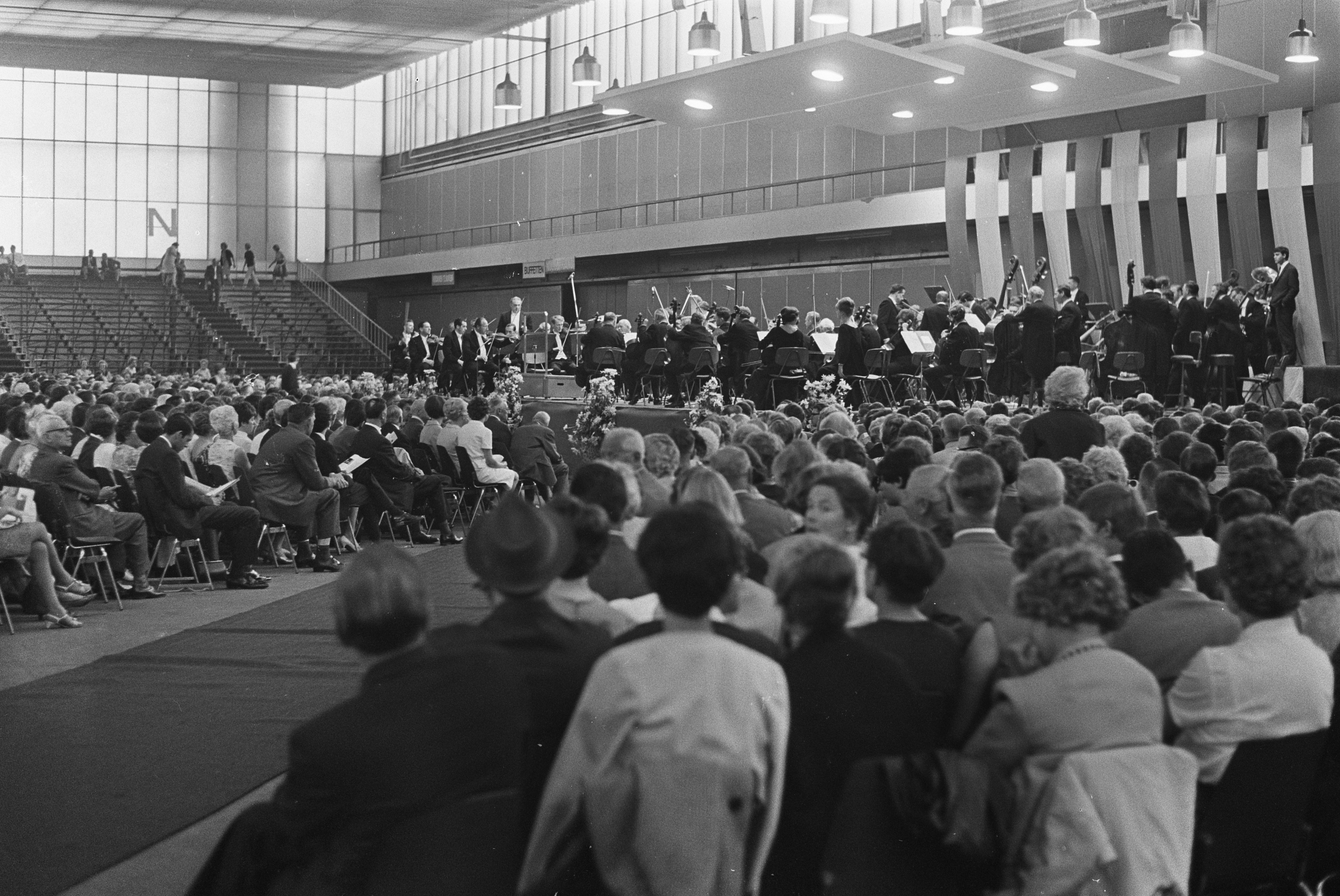 Collectie / Archief : Fotocollectie Anefo Reportage / Serie : [ onbekend ] Beschrijving : RAI-concert 1967 onder leiding van gastdirigent André Vandernoot Datum : 1 juli 1967 Trefwoorden : concerten, dirigenten, publiek, toeschouwers Persoonsnaam : Vandernoot, A. Fotograaf : Merk, Ben / Anefo Auteursrechthebbende : Nationaal Archief Materiaalsoort : Negatief (zwart/wit) Nummer archiefinventaris : bekijk toegang 2.24.01.05 Bestanddeelnummer : 920-4519